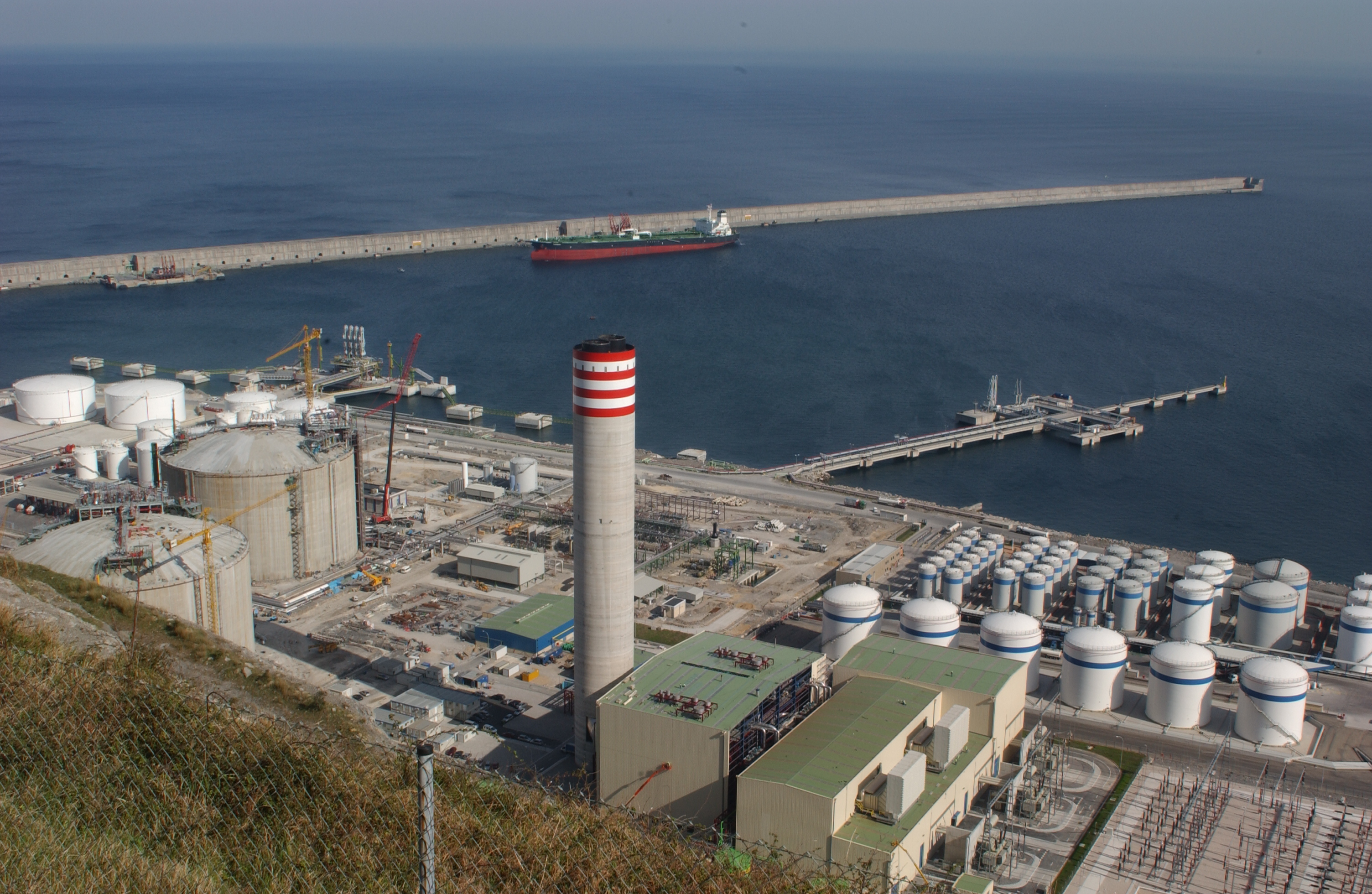 Bizkaiko Badia Elektrizitatea